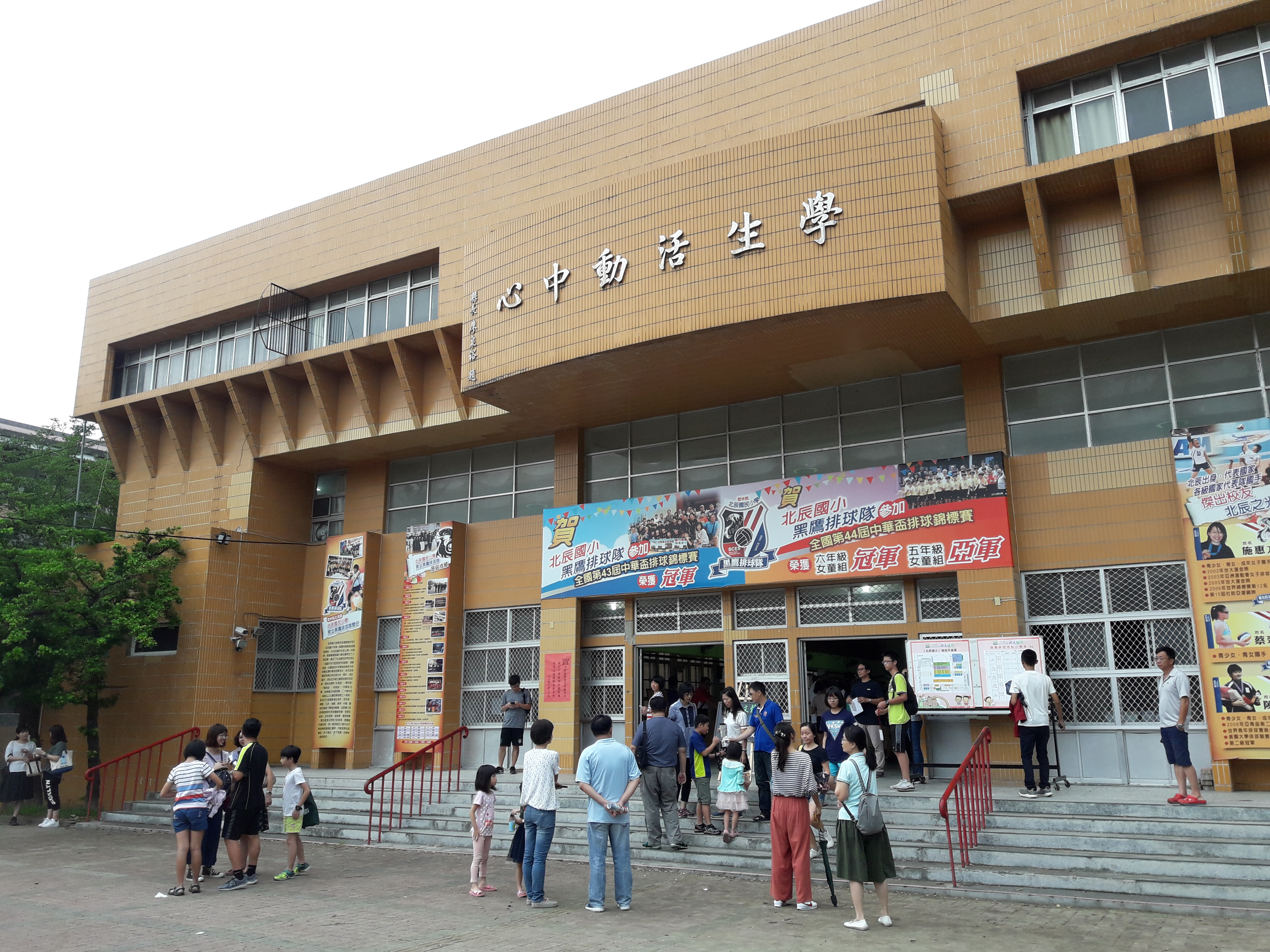 雲林縣北港鎮北辰國民小學活動中心。攝於2018年9月15日。